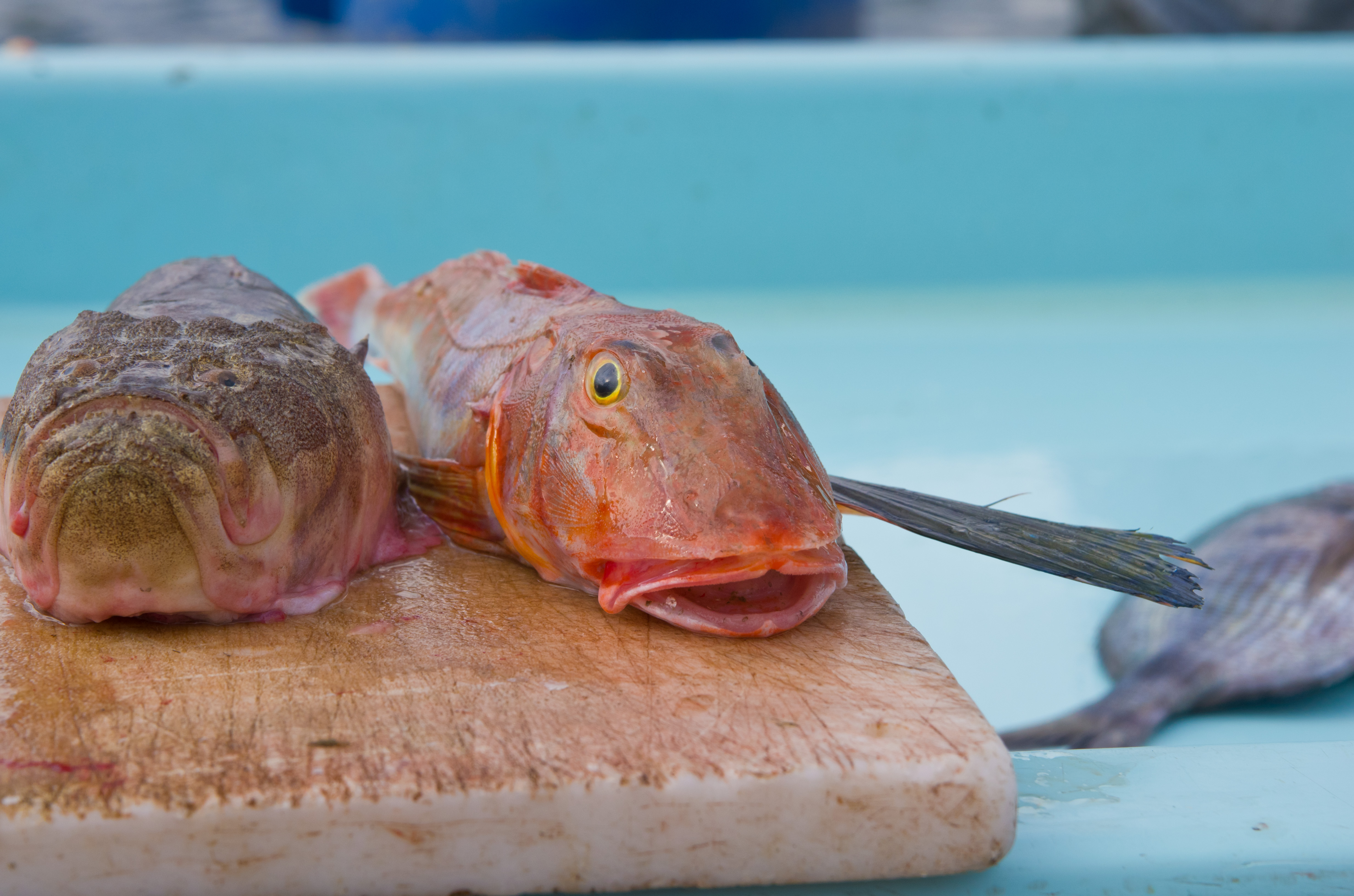 Poisson au Vieux-Port de Marseille